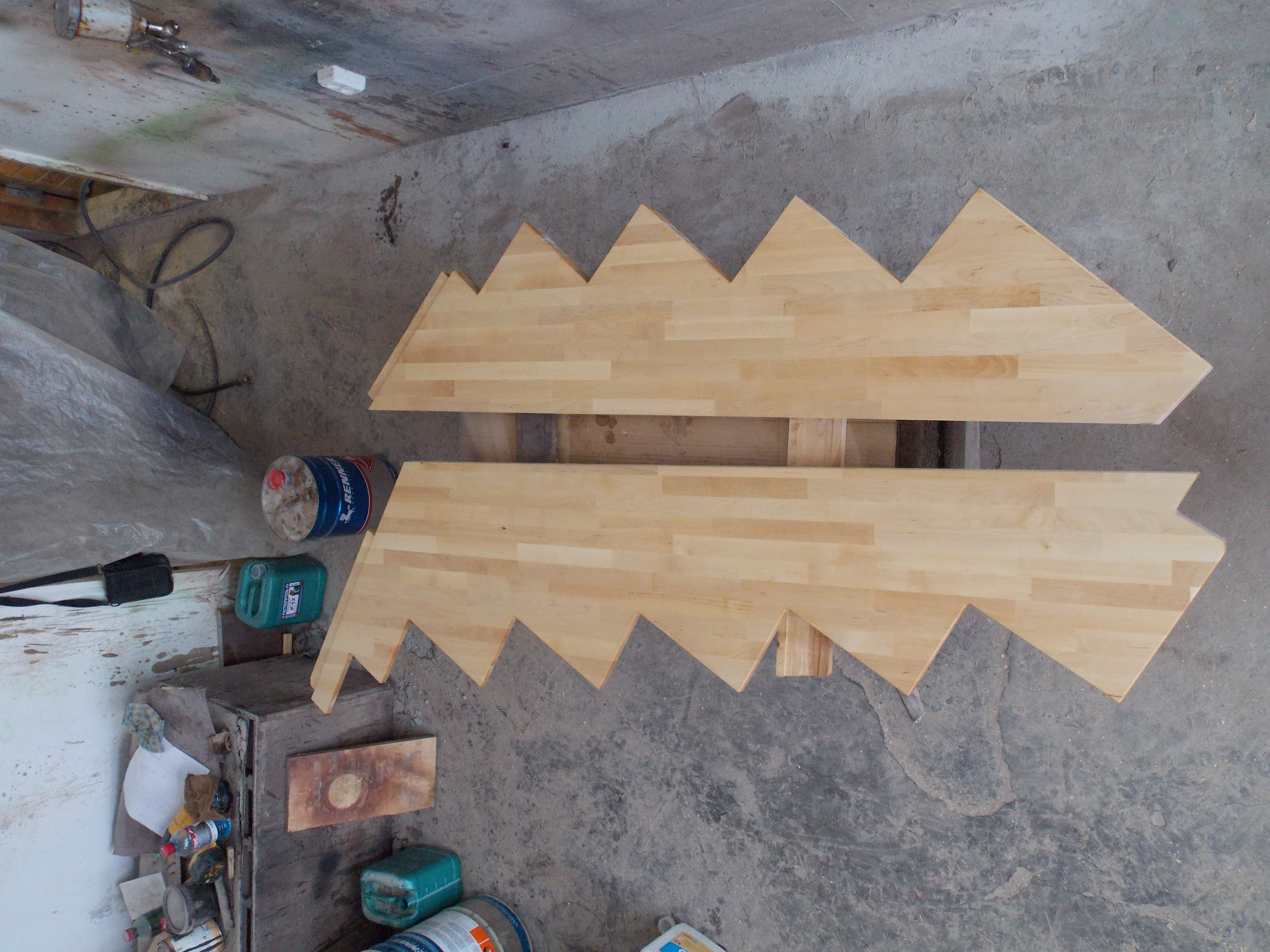 Лакированные тетивы с вырезами, уже готовые к установке